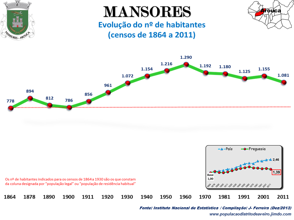 Evolução da População 1864 / 2011